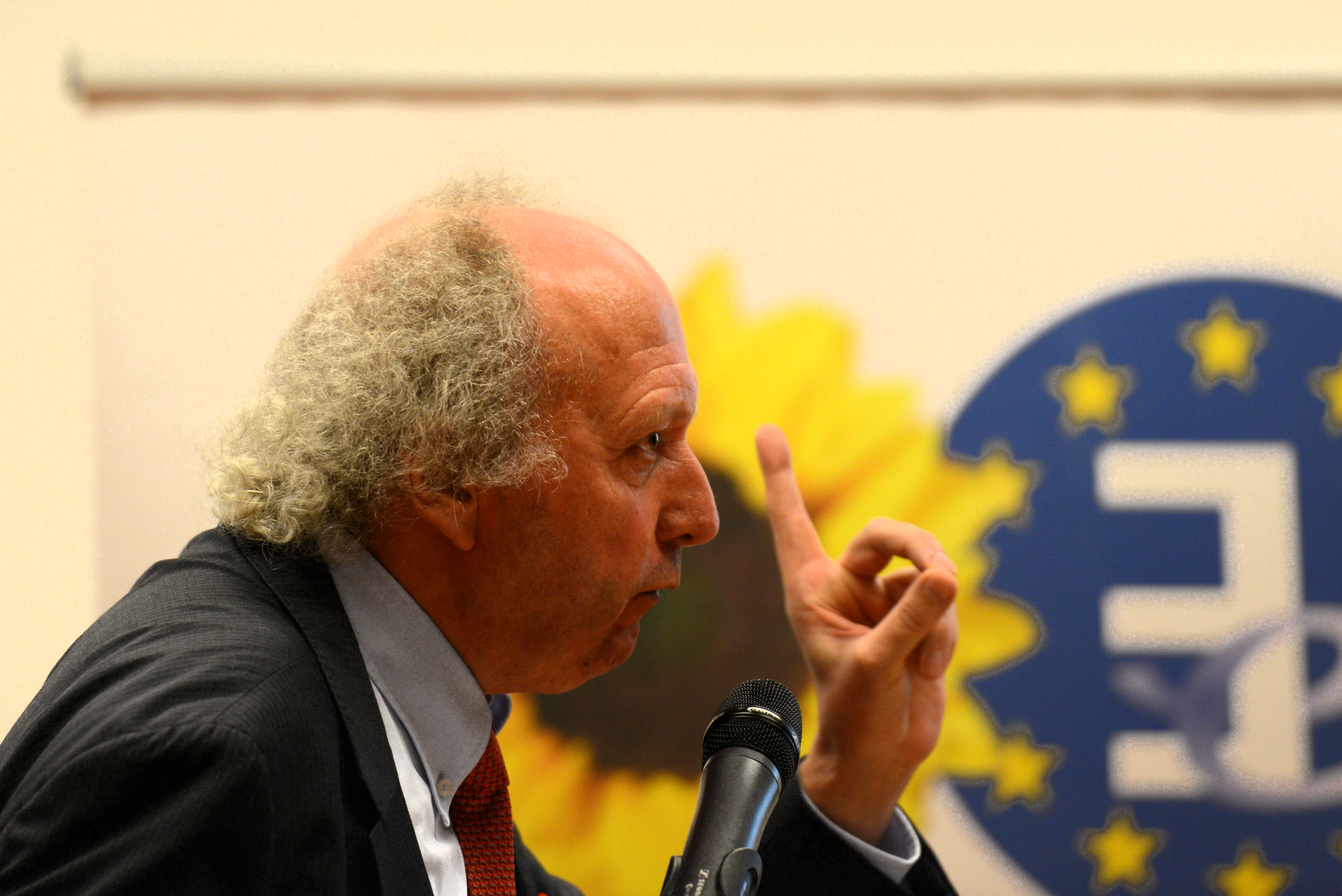 Den Hans-Peter Walter, Direkter vun der SuperDrecksKëscht, bei senger Interventioun an der Conférence-débat: «Économie circulaire et nouvelles formes de consommation. Stratégies européennes et perspectives luxembourgeoises», den 20. Oktober 2014 am CRP Henri-Tudor um Kierchbierg.